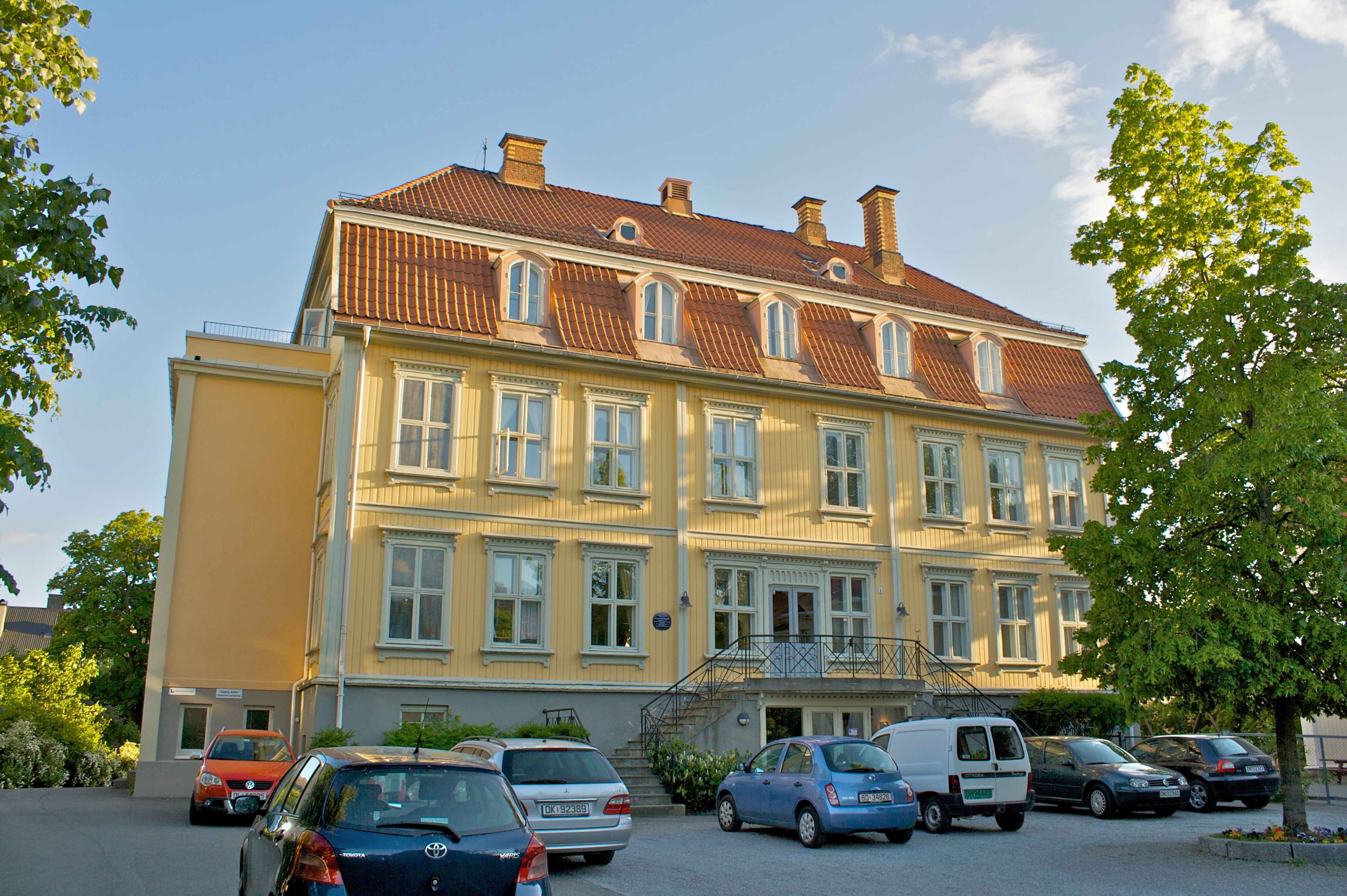 Hovedhuset på Schafteløkken på Frogner i Oslo. Huset et empirehus fra omkring 1807, og har adresse Zahlkasserer Schafts plass 1.